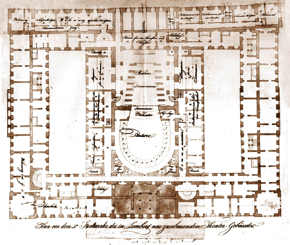 План Скарбківського театру у Львові.